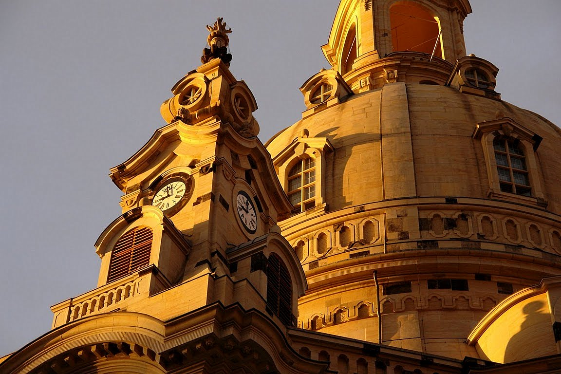 Drezda, Freuenkirche